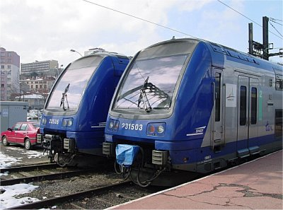 A Z23500 EMU at Saint Etienne Chateaucreux.